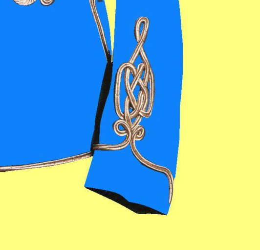 Vitéz-Kötés auf der Uniform der k.u.k und k.u. Husaren